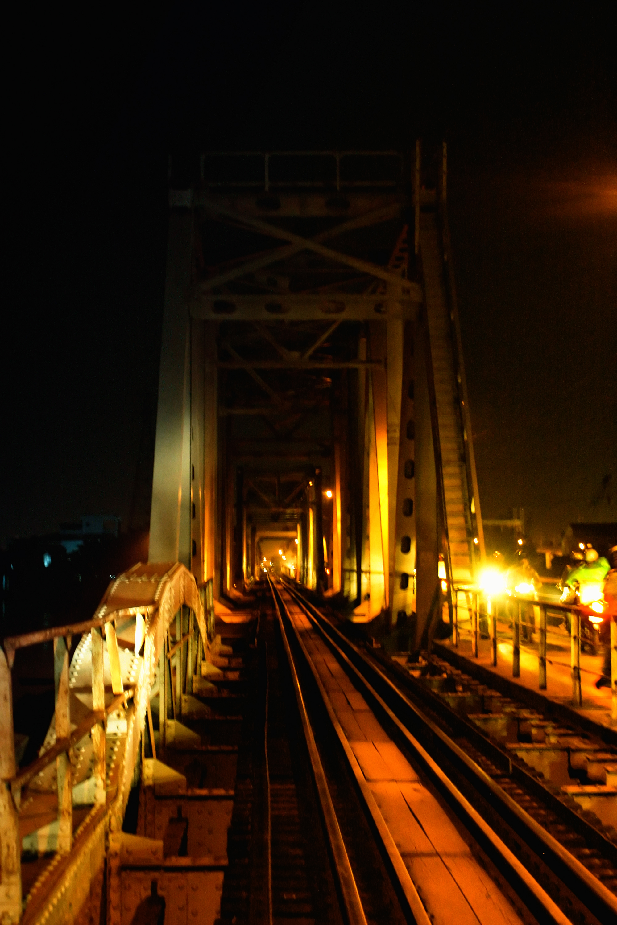 Cầu Bình Lợi về đêm